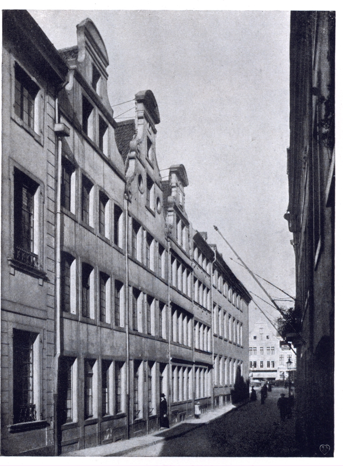 Zollstraße: Giebelhäuser 6, 8, 10; Haus 12 und Seite des Grupellohaus, welches zum Marktplatz gehört